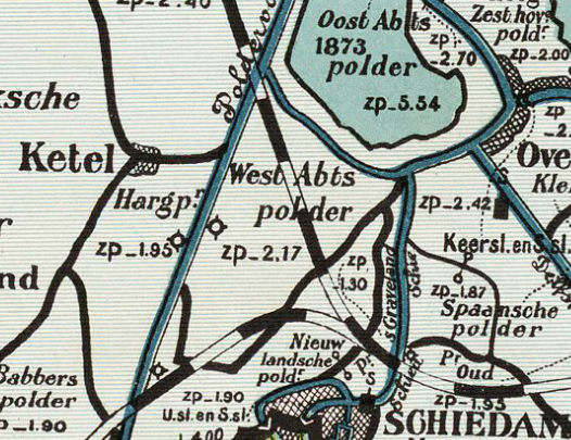 West_Abts_polder